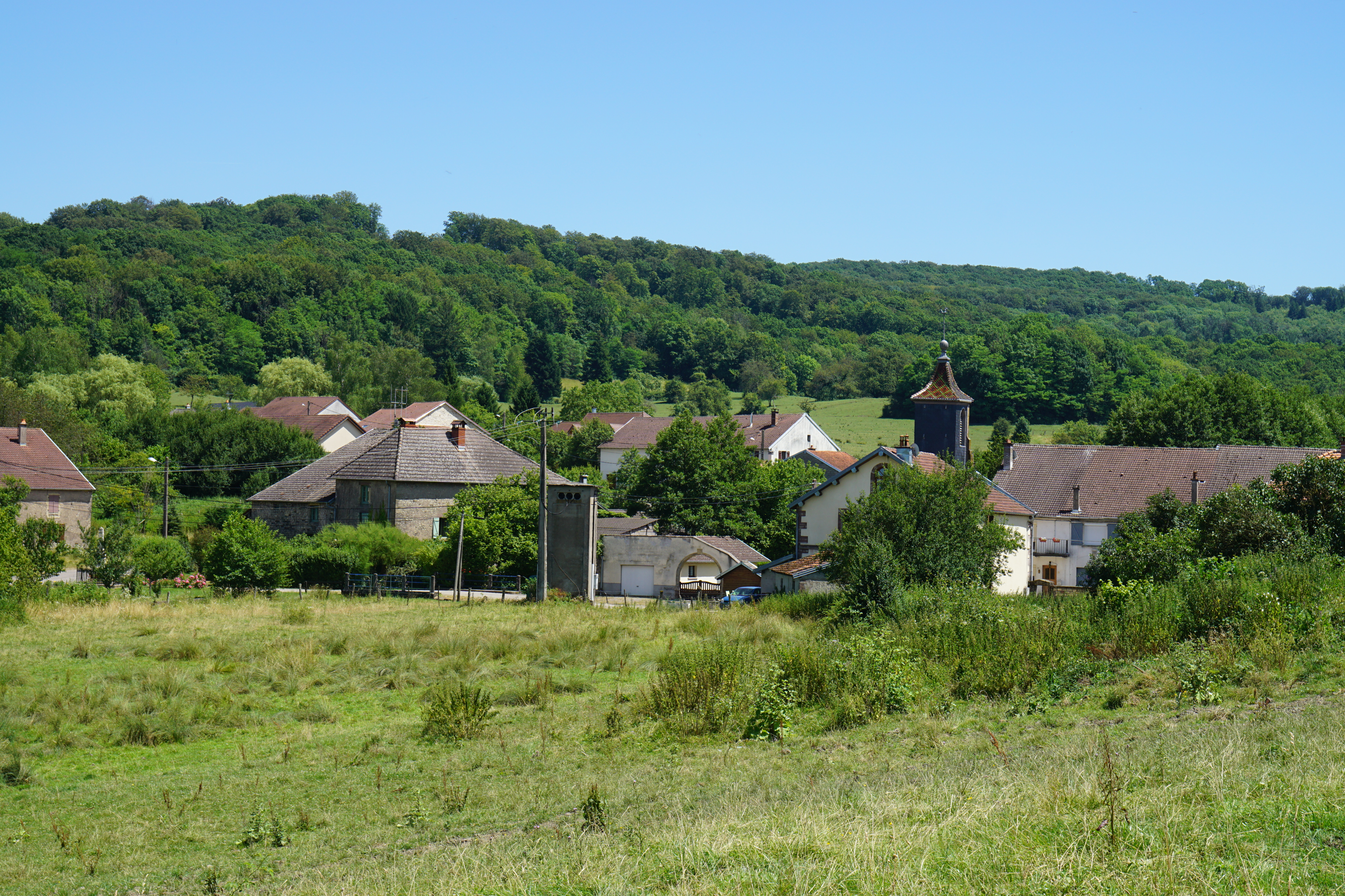 Betoncourt-lès-Brotte.